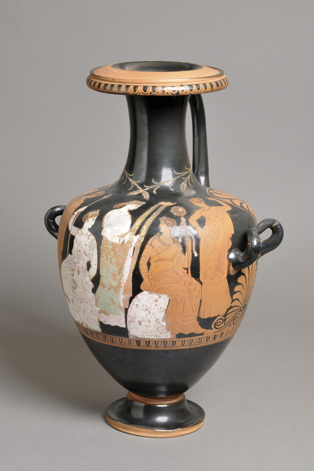 Hydrie - Mystères d'Eleusis, Athènes, Musée des Beaux-Arts, Lyon, France.